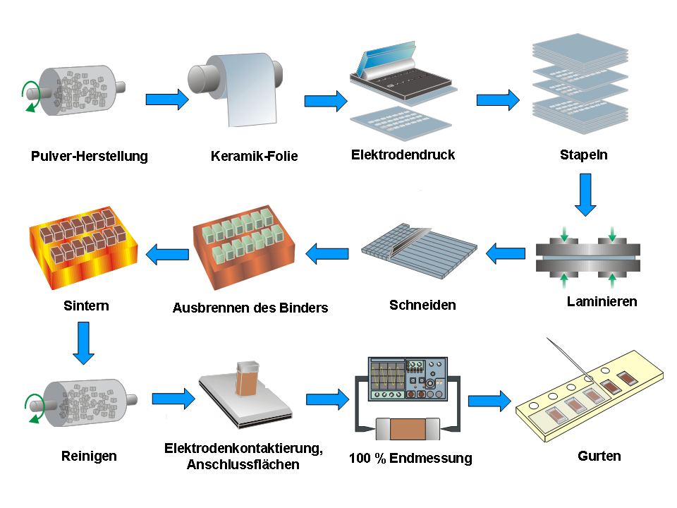 MLCC-Herstellprozess